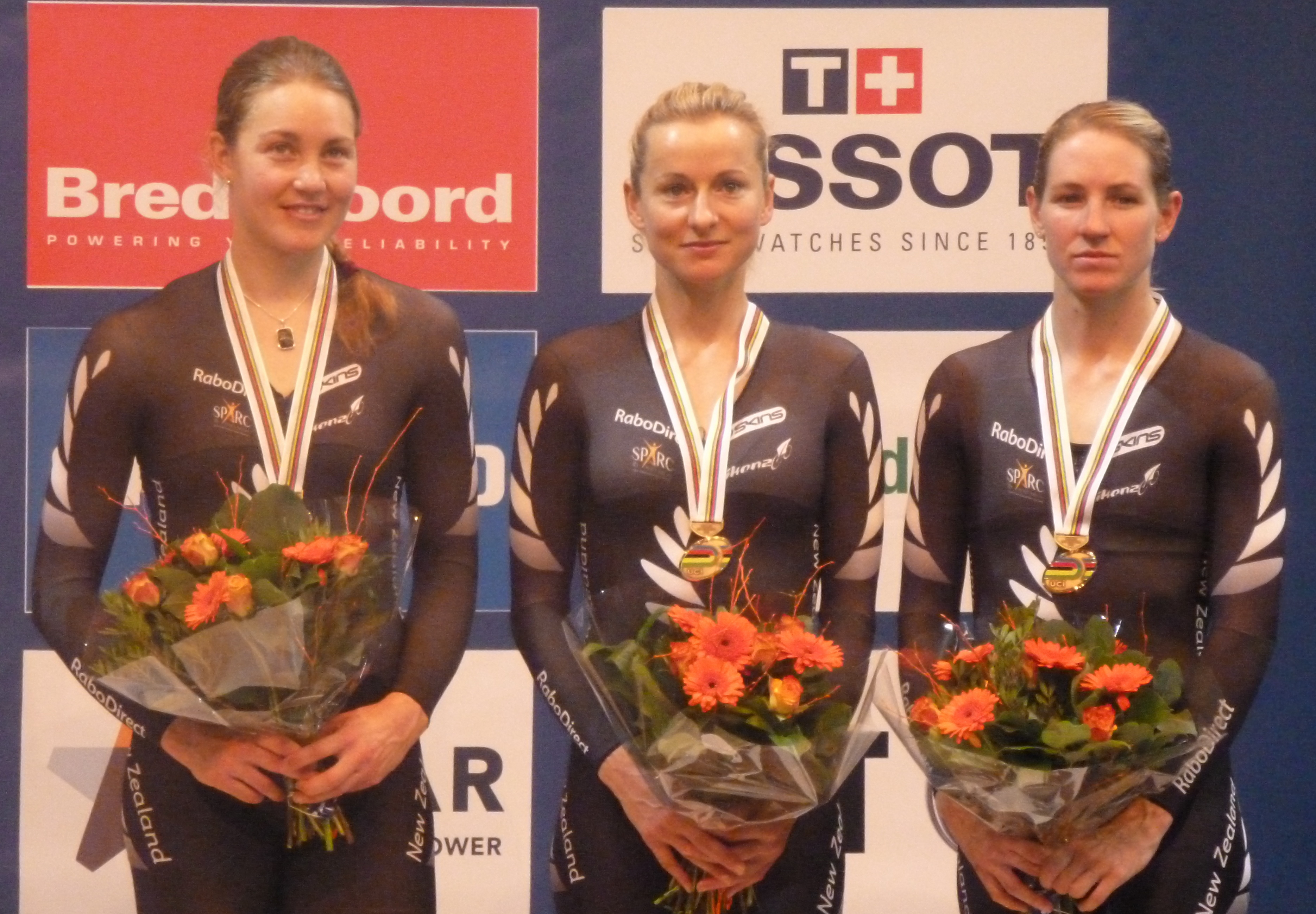 Neuseeländisches Team in der Mannschaftsverfolgung bei der Bahn-WM 2011, v.l.n.r.:Jaime Nielsen, Kaytee Boyd, Alison Shanks